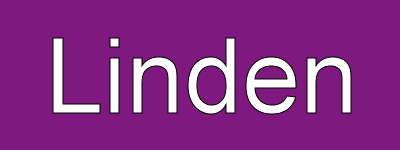 Linden destination sign.